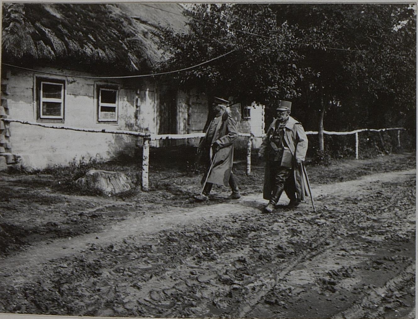 Der deutsche Generalleutnant Karl Litzmann und General der Infanterie Friedrich Csanady von Bekes in Pawlowiczy